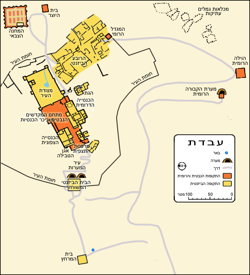 Avdat עבדת